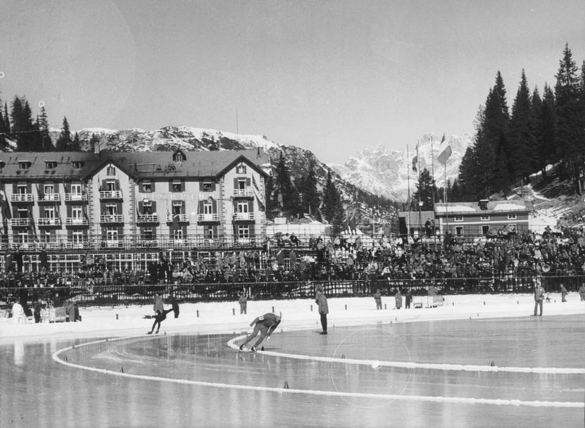 Pista di pattinaggio a Misurina (Cortina 1956)